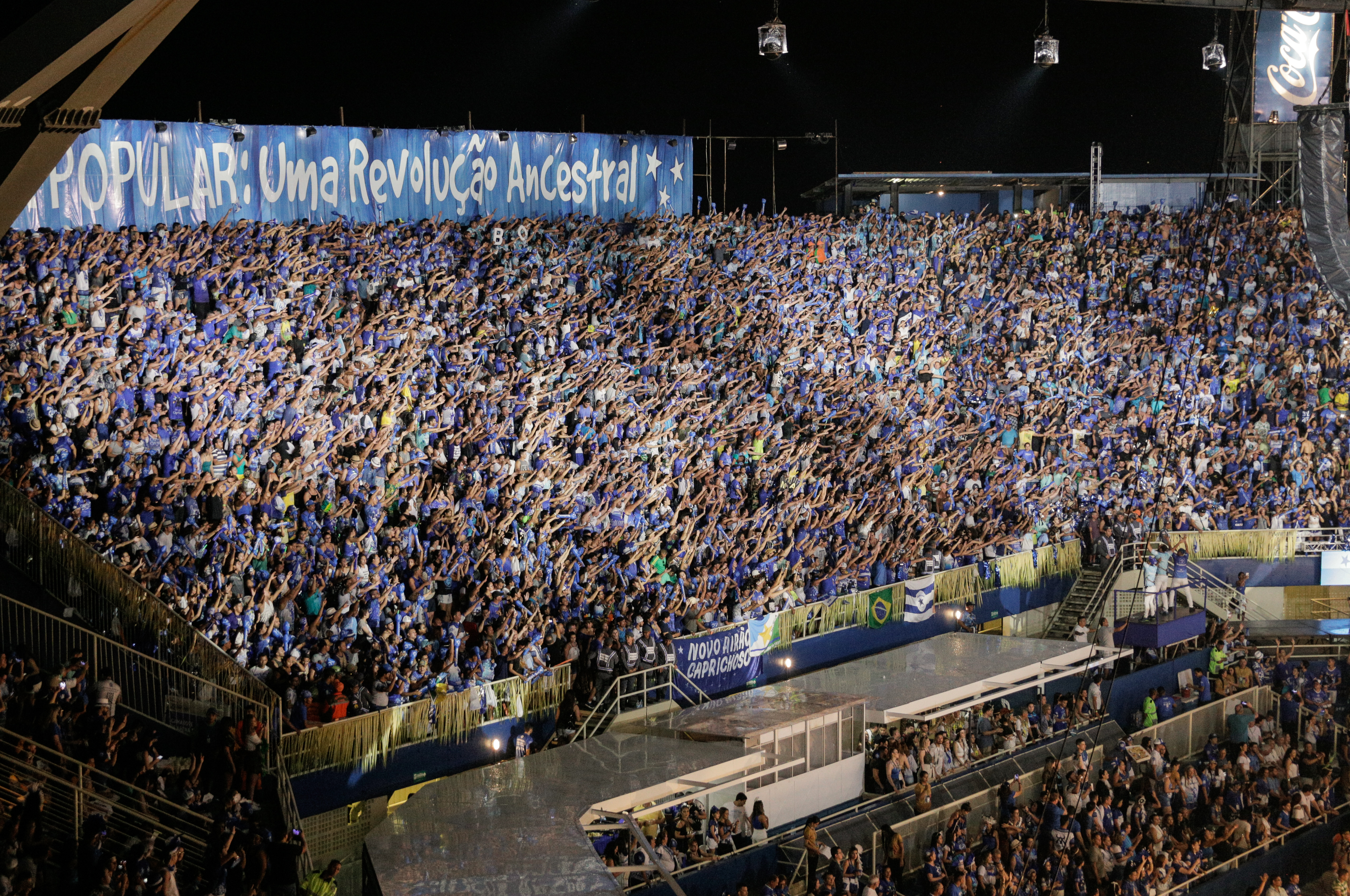 Nos dois dias de apresentações, o boi-bumbá Caprichoso, com seu azul e branco, e, o boi Garantido, caracterizado pelas cores vermelho e branco, encantaram o público com suas alegorias e toadas que revivem a lenda de Catirina e Pai Francisco, o cotidiano do caboclo ribeirinho e outros mitos amazônicos. 1/7/2018 Fotos: Clara Angeleas/MinC